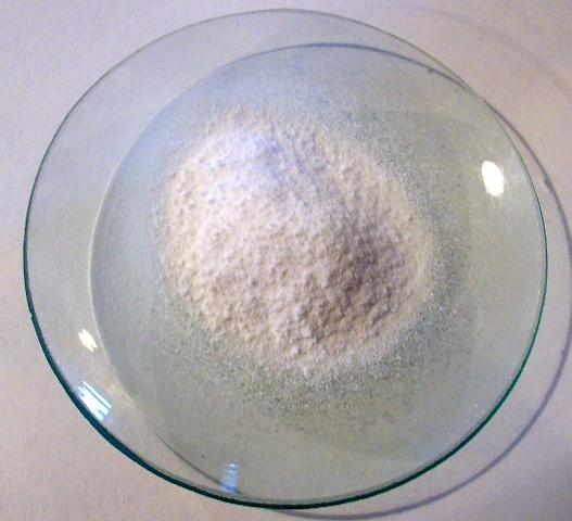 KIO3